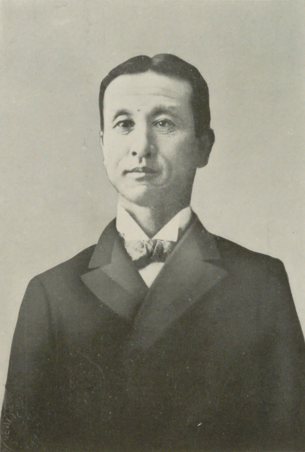 Portrait of Kikuchi Takeo (菊池武夫, 1854 – 1912)